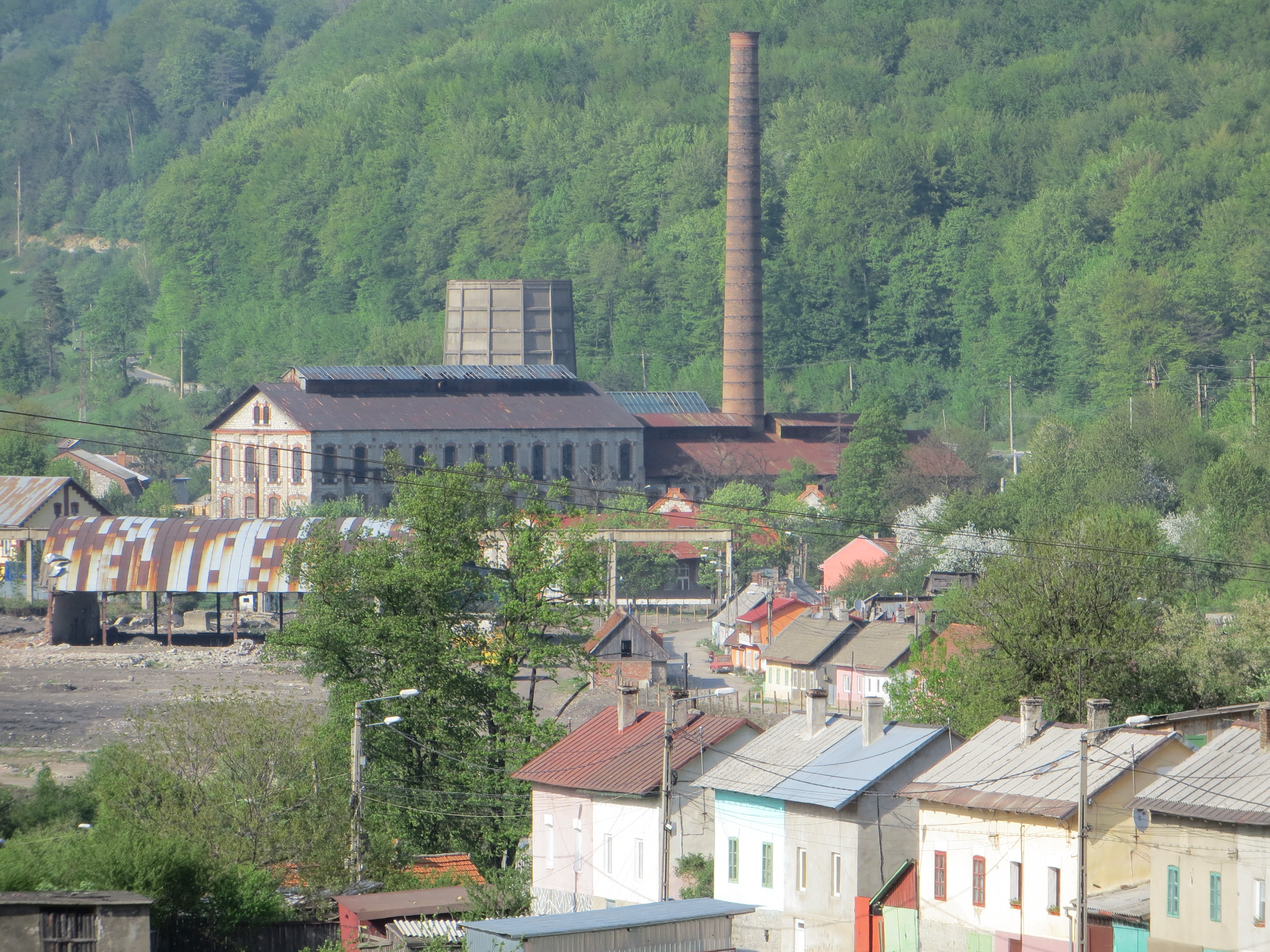 Uzinele de fier Anina